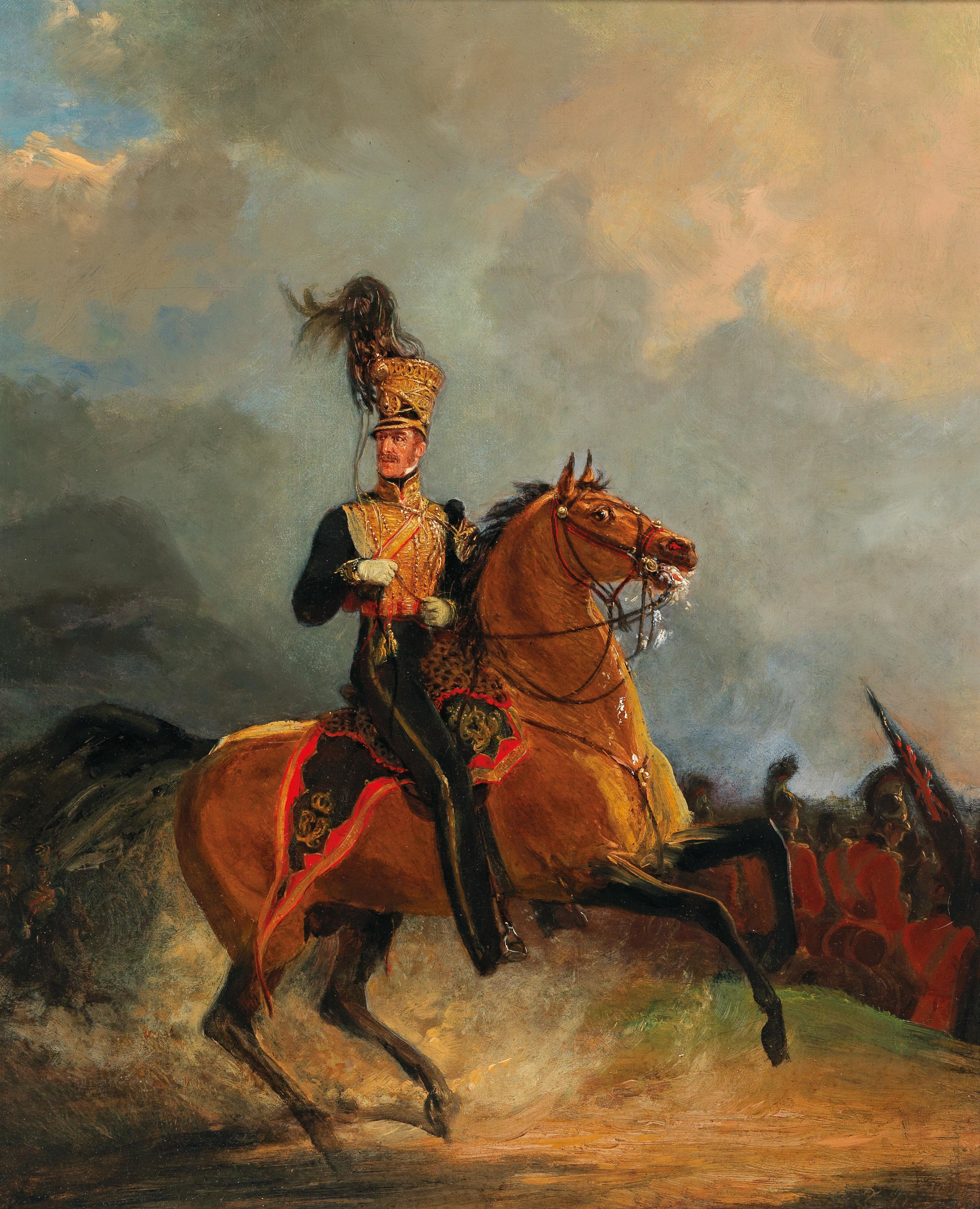 General Leutnant Lord Uxbridge(1768–1854), Kavallerieoberbefehlshaber der anglo-holländischen Armee bei Waterloo, monogrammiert J. W. P., Öl auf Leinwand, 43 x 34,5 cm